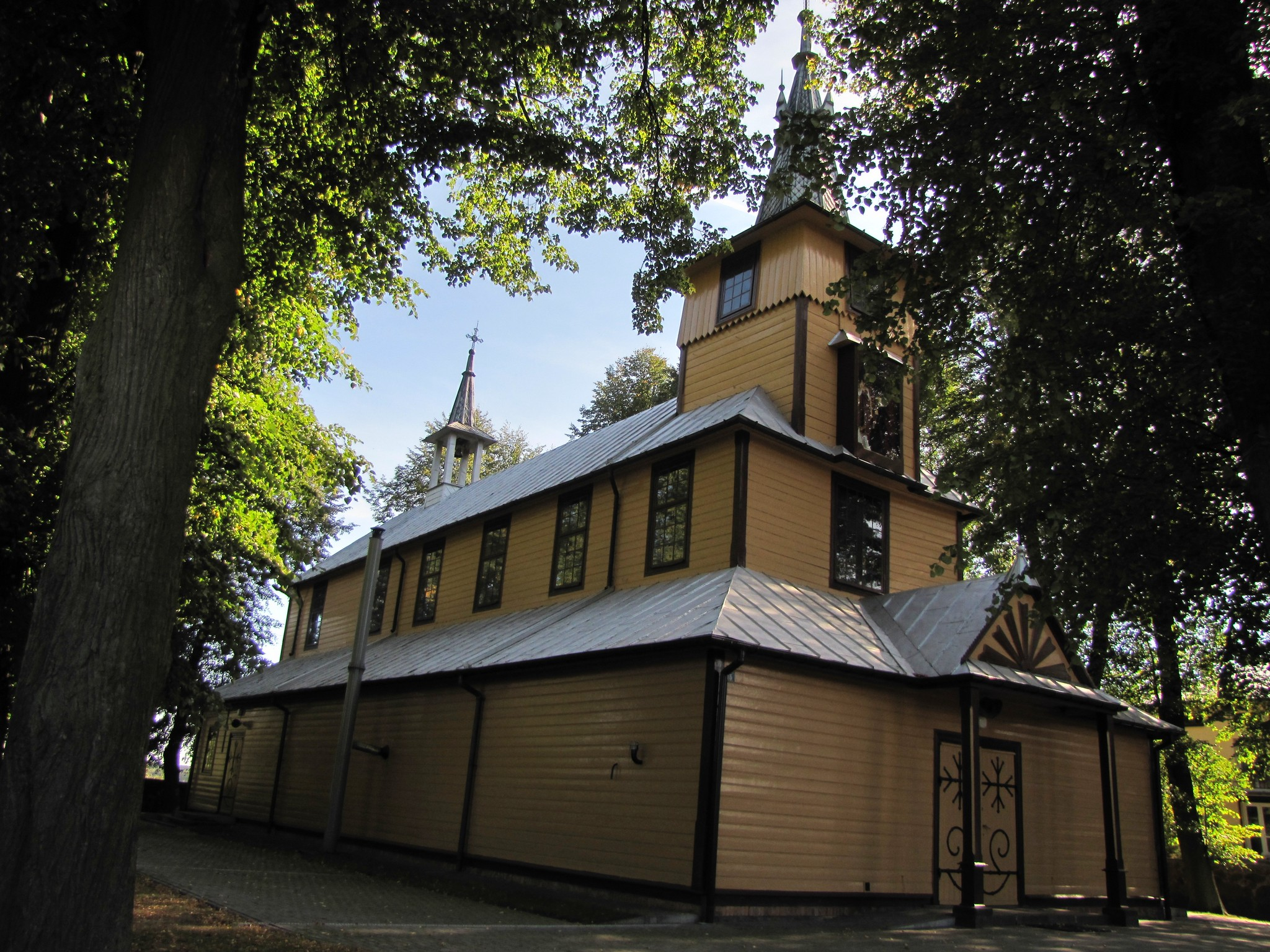 Swory Kościół